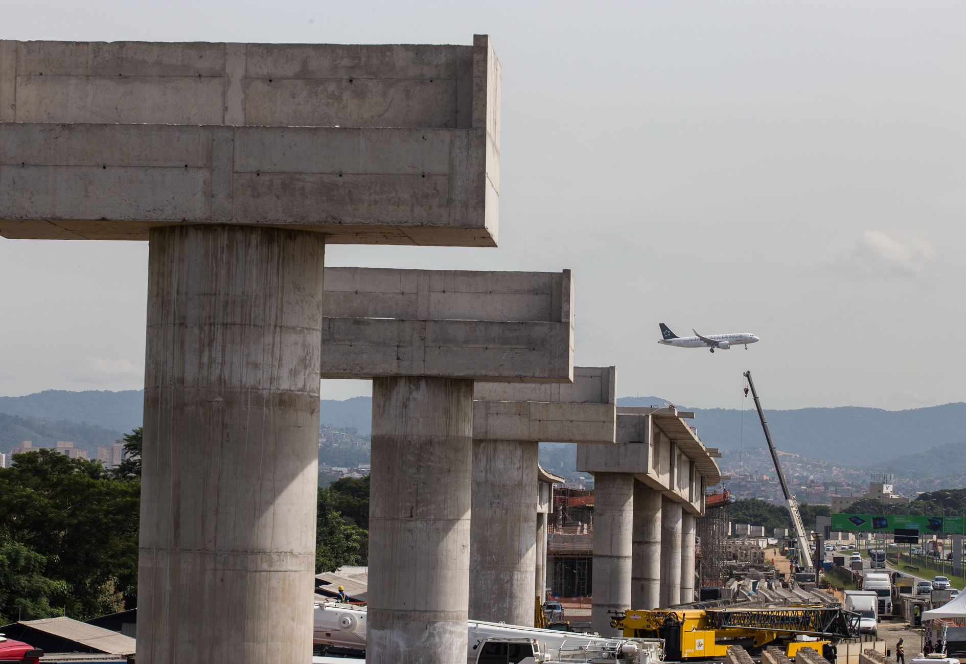 O Governador de São Paulo fez visita técnica nas obras da Linha 13 Jade da CPTM em Guarulhos. Acompanhou também o içamento de vigas ao longo do trecho elevado. Essa linha ligará a capital ao Aeroporto Internacional de Garulhos. Guarulhos- 29/03/2016 - São Paulo - Foto: Eduardo Saraiva/A2IMG.